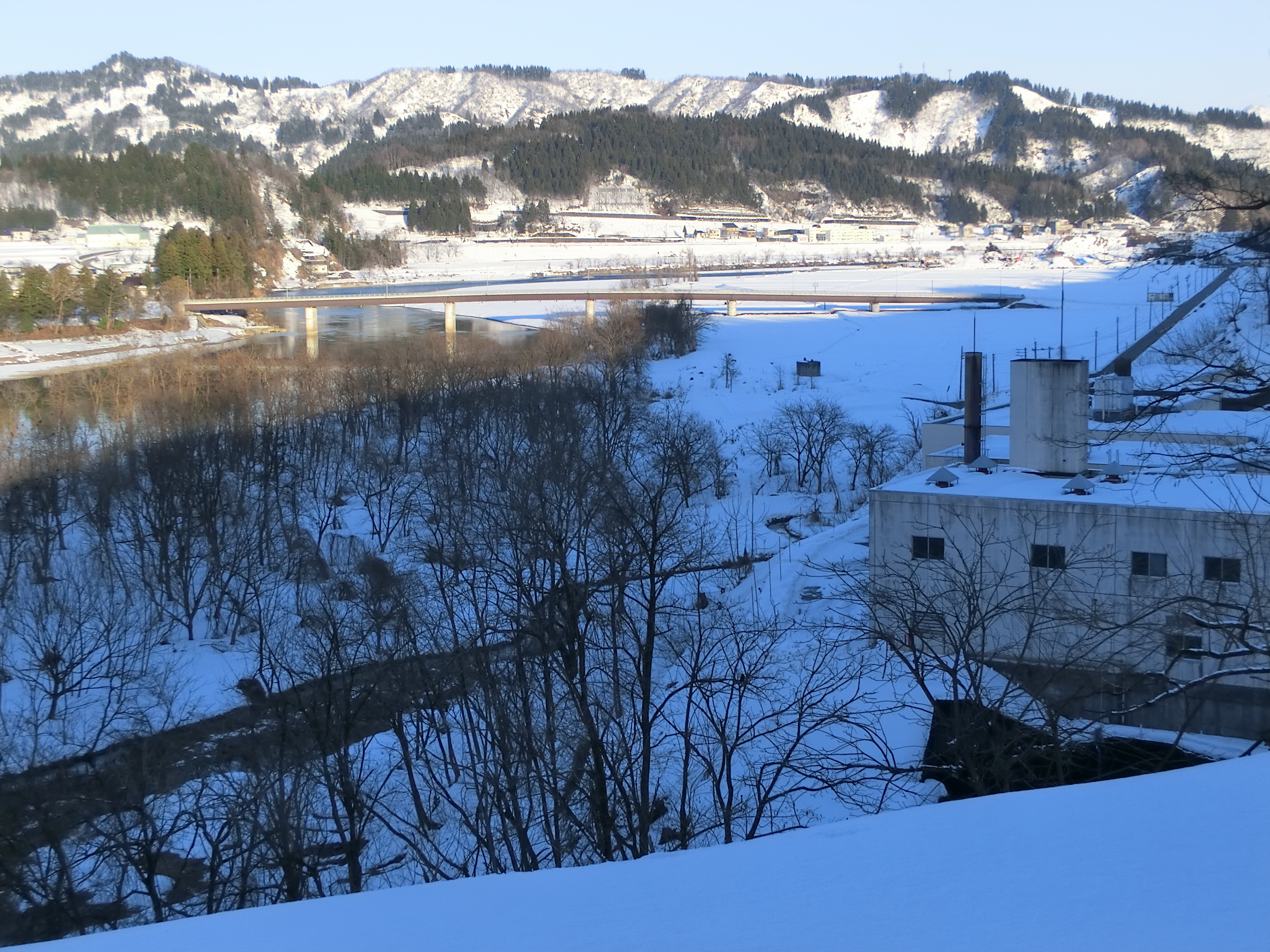 この画像は2014年1月7日投稿者によって新潟県長岡市川口牛ヶ島にて撮影された牛ヶ島大橋の写真。写真右側に写っている施設は「小千谷市衛生センター清流園」。（長岡市川口牛ヶ島2537-1）